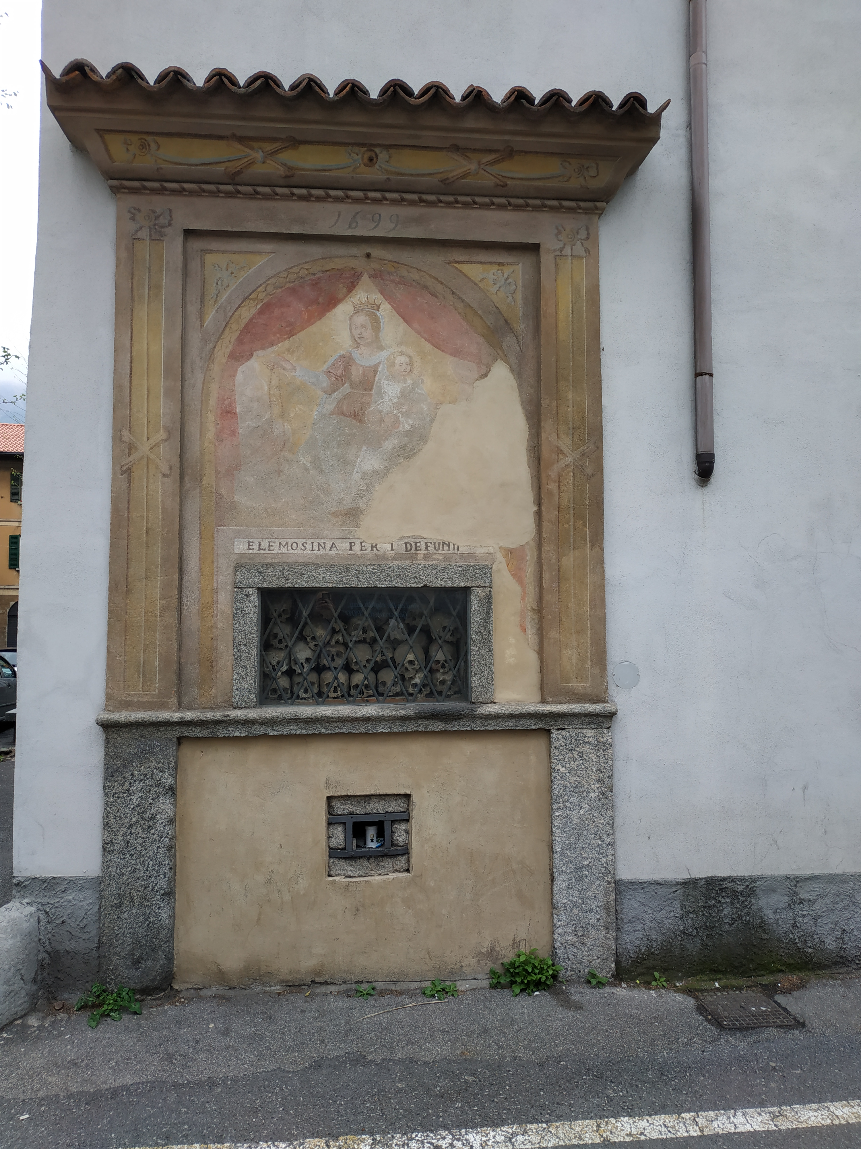 Ossario a Pescarenico del 1699 con una finestra ferrata all'interno della quale restano ben visibili numerosi teschi umani risalenti ai Frati francescani morti in seguito all'epidemia di Peste del 1630 oltre una piccola fessura in pietra sottostante che fungeva da raccolta delle offerte per i defunti connessi alla terribile calamità ampiamente descritta anche dal Manzoni nel suo romanzo.